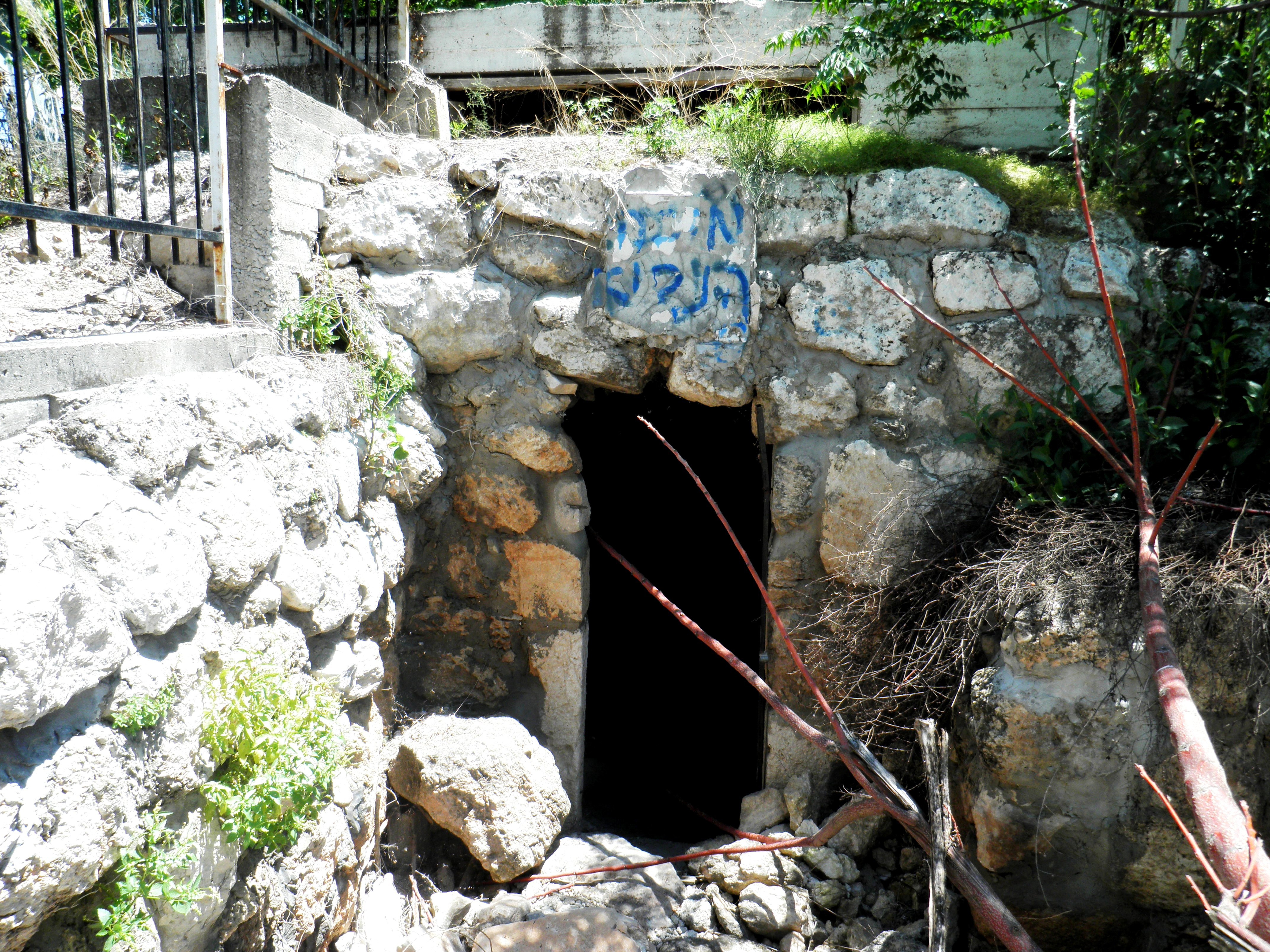 קבר מיכה הנביא